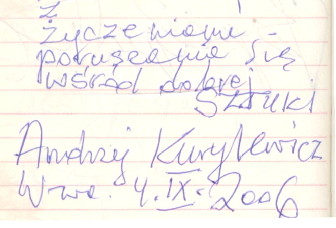 Andrzej Kurylewicz's (1932-2007) autograph